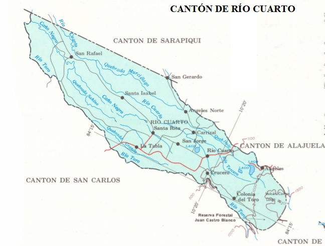 Cantón de Río Cuarto